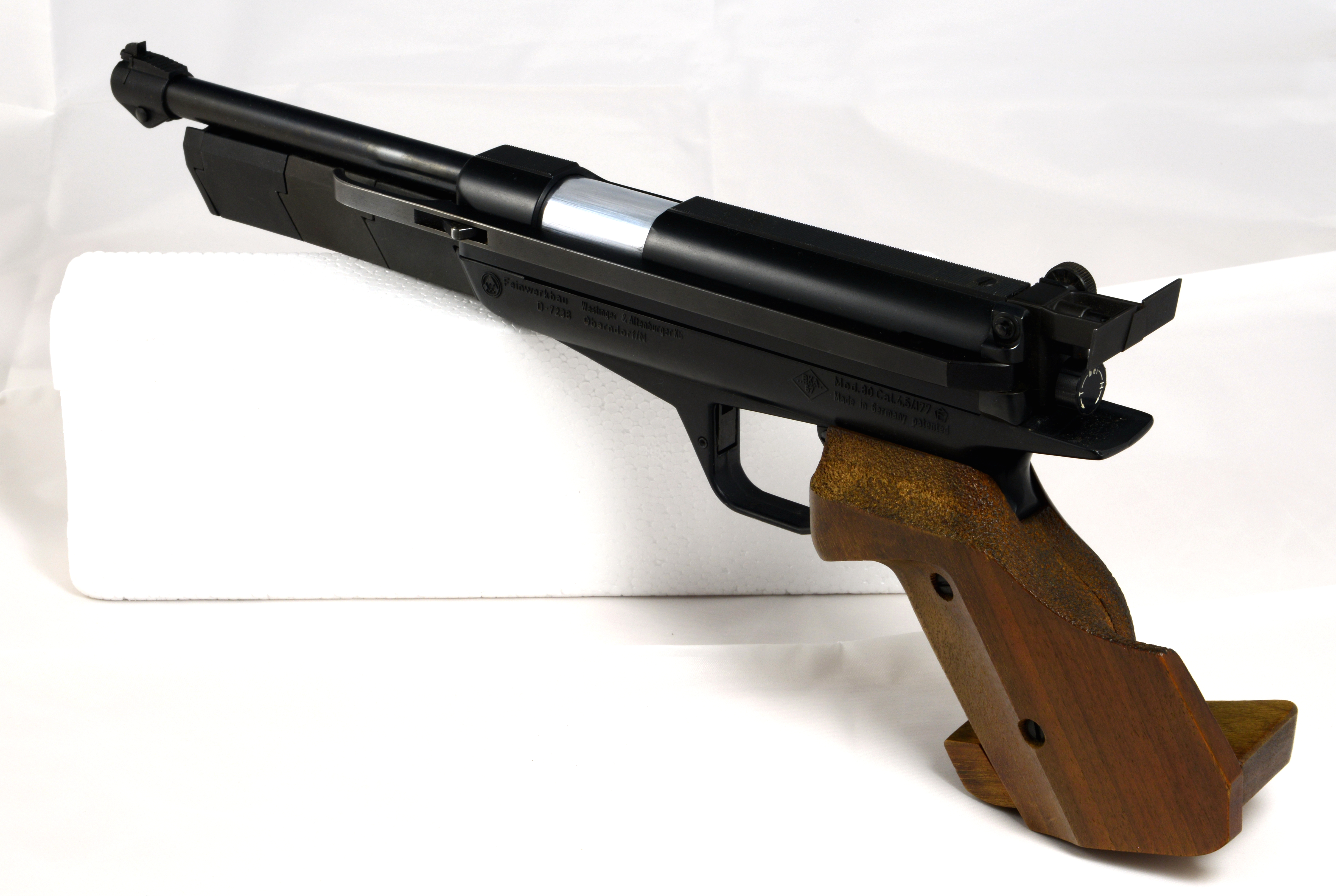 D'Loftpistoul Modell 80, Cal. 4,5mm/.177 vu Feinwerkbau.